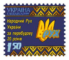 Марка: Фото